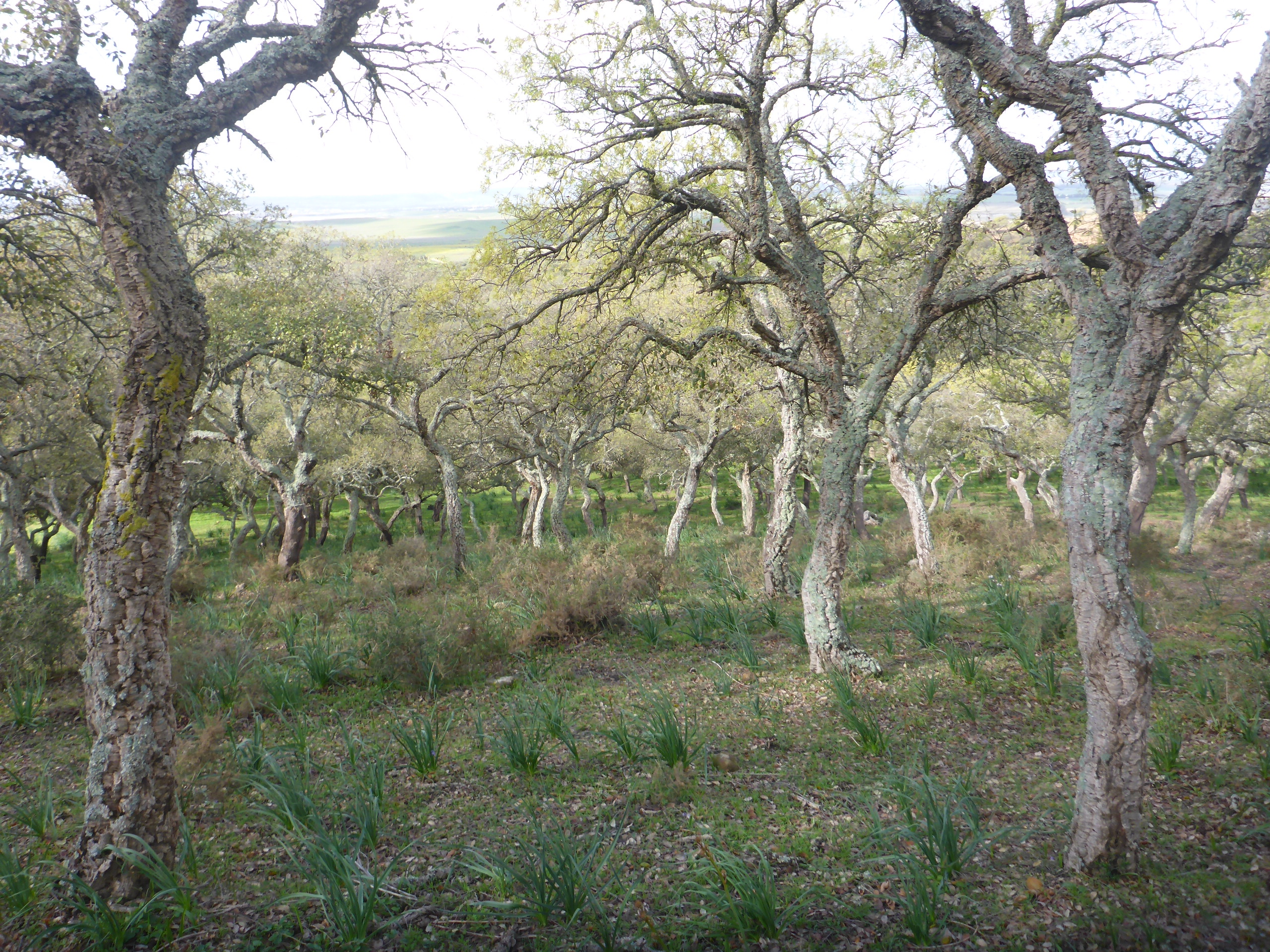 Sierra del Retín (Barbate, España)